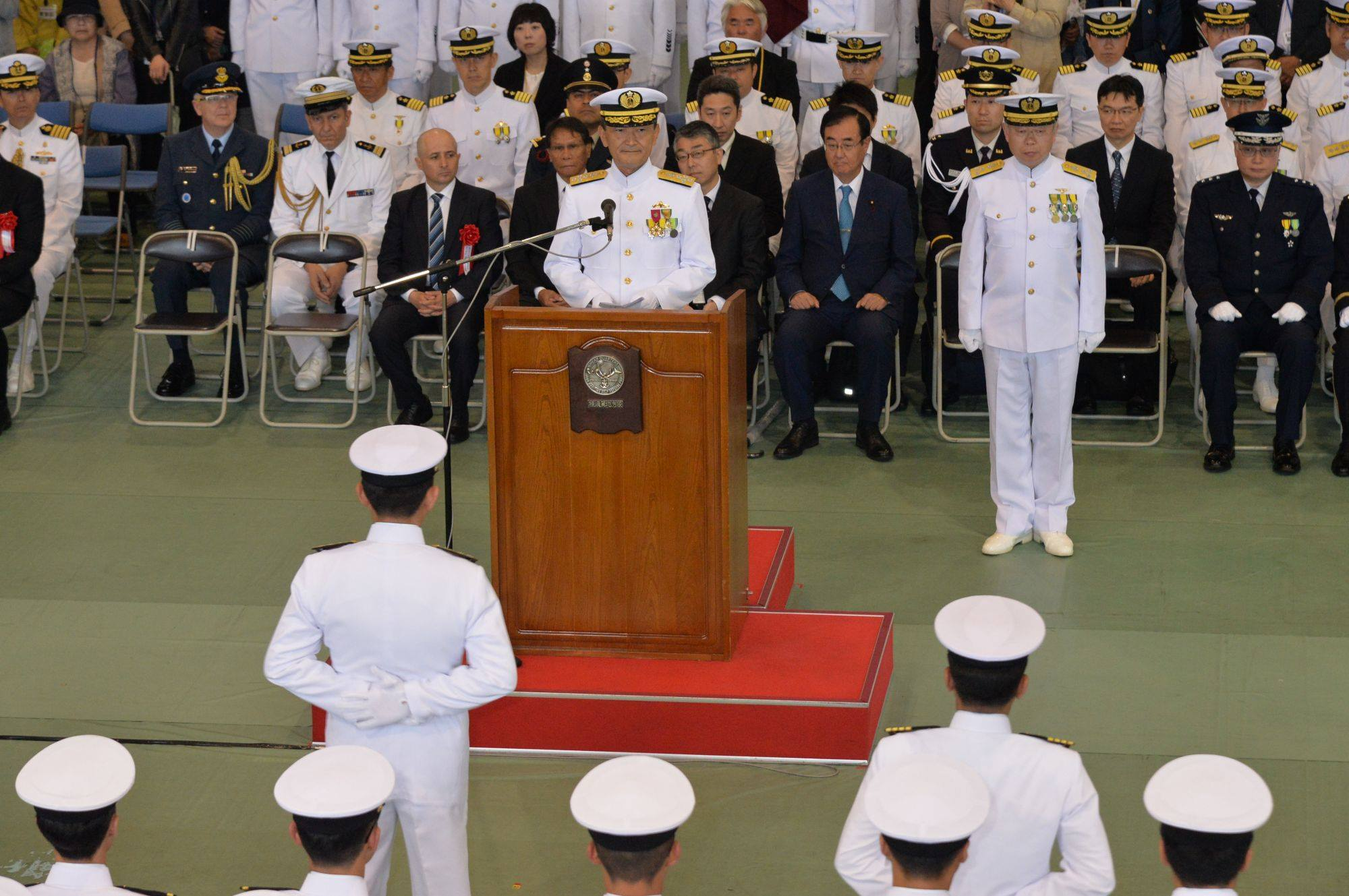 訓示する横須賀地方総監